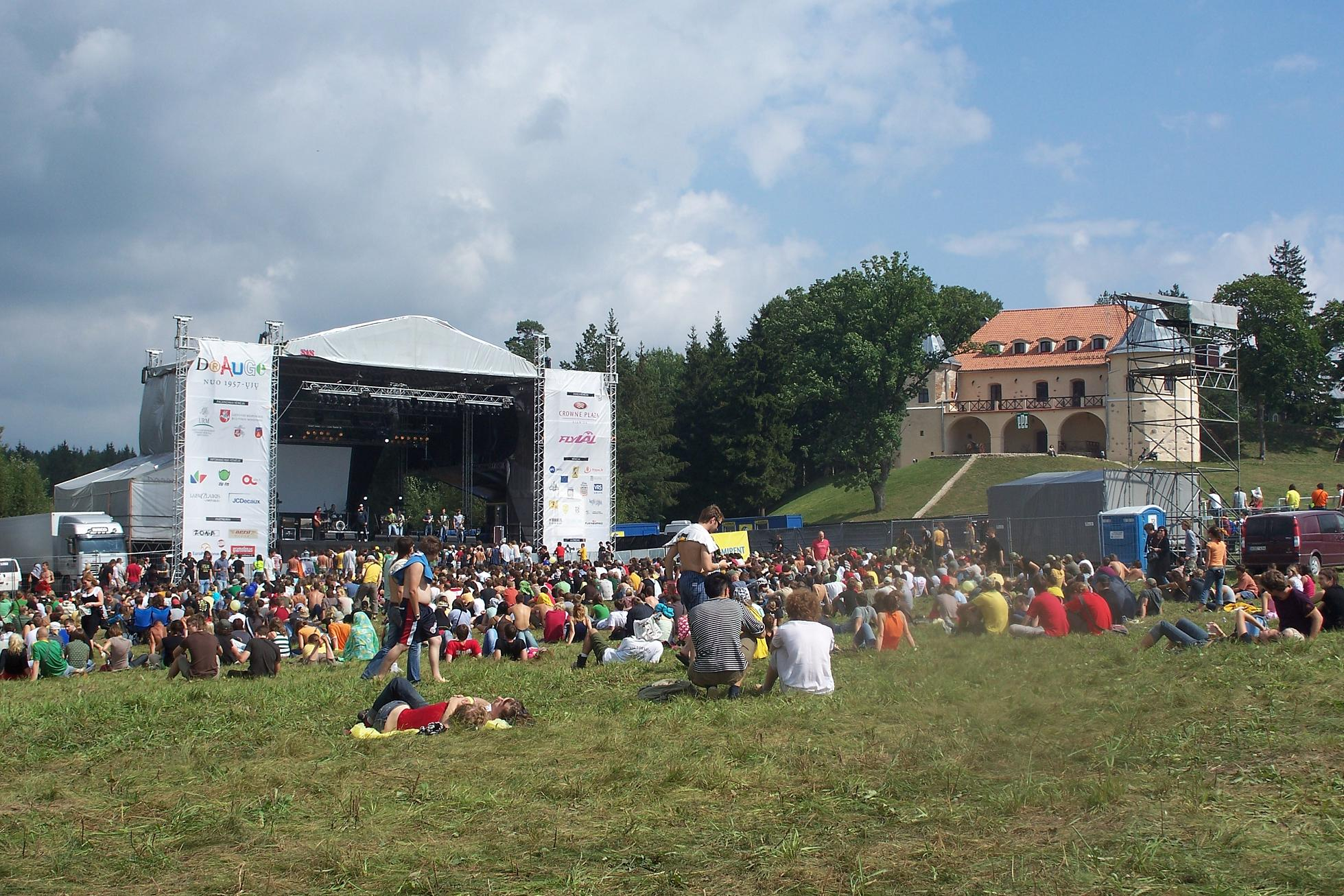 Festivalis Be2gether prie Norviliškių pilies